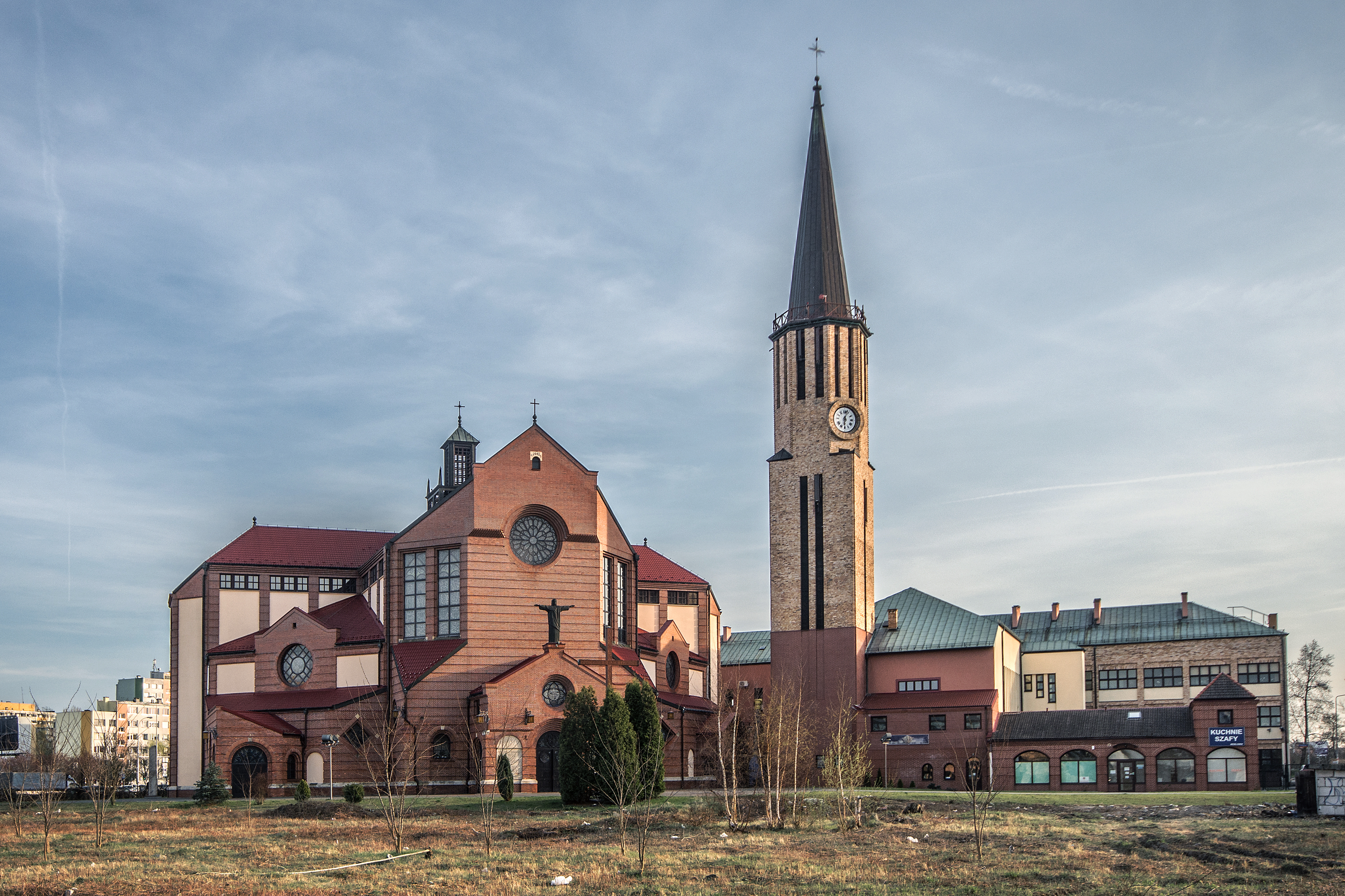 Kościół św. Maksymilana Kolbe, Wrocław